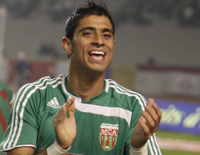 Mohamed Derrag lors d'un match du Mouloudia Club d'Alger